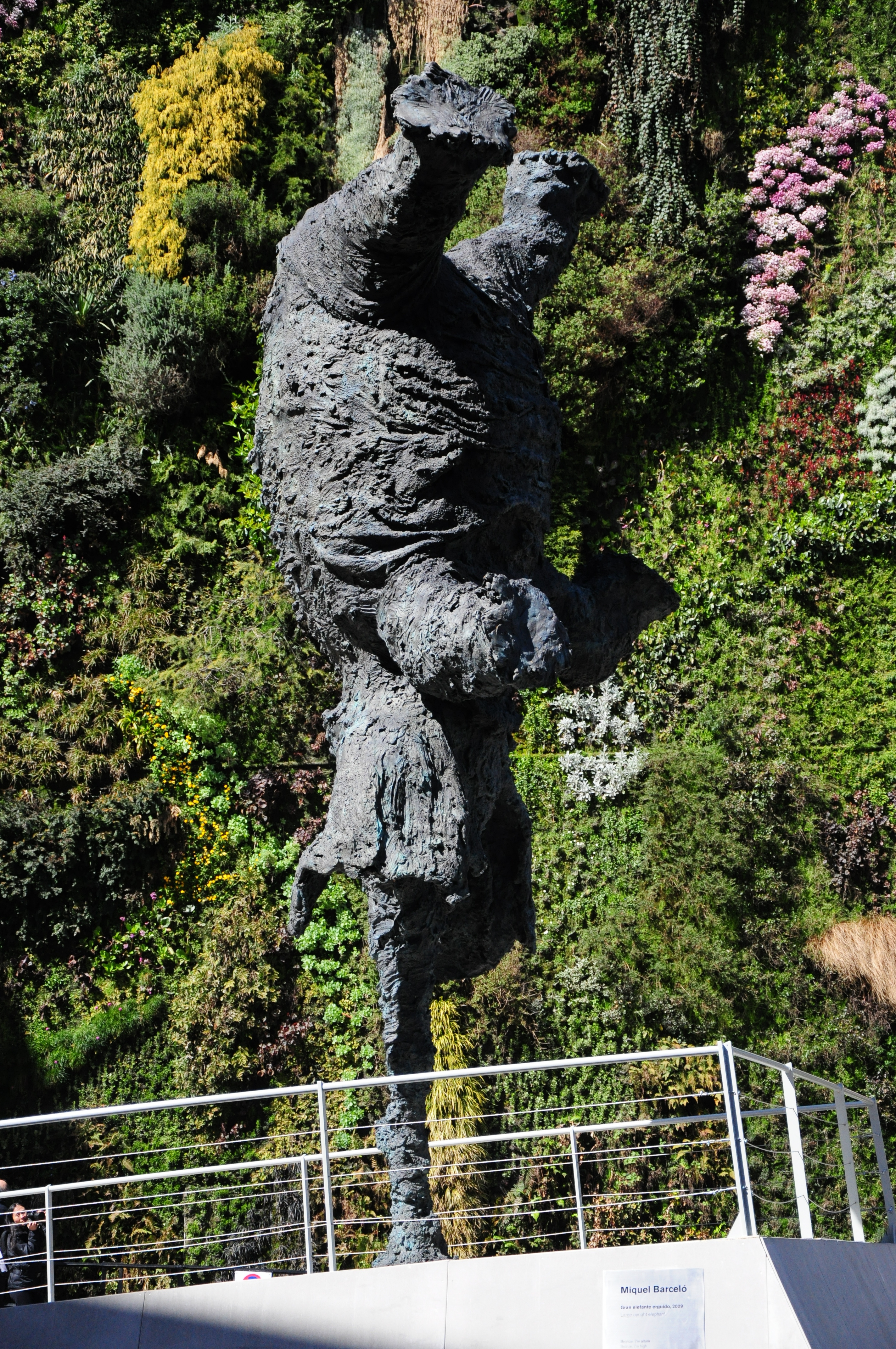 Escultura "Gran Elefant dret" de Miquel Barceló realizada en los talleres Alfa Arte de Eibar y expuesta en Madrid.